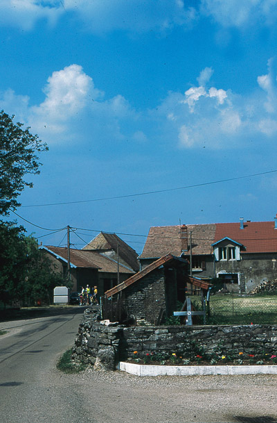 Centre du village de Goux sous Landet